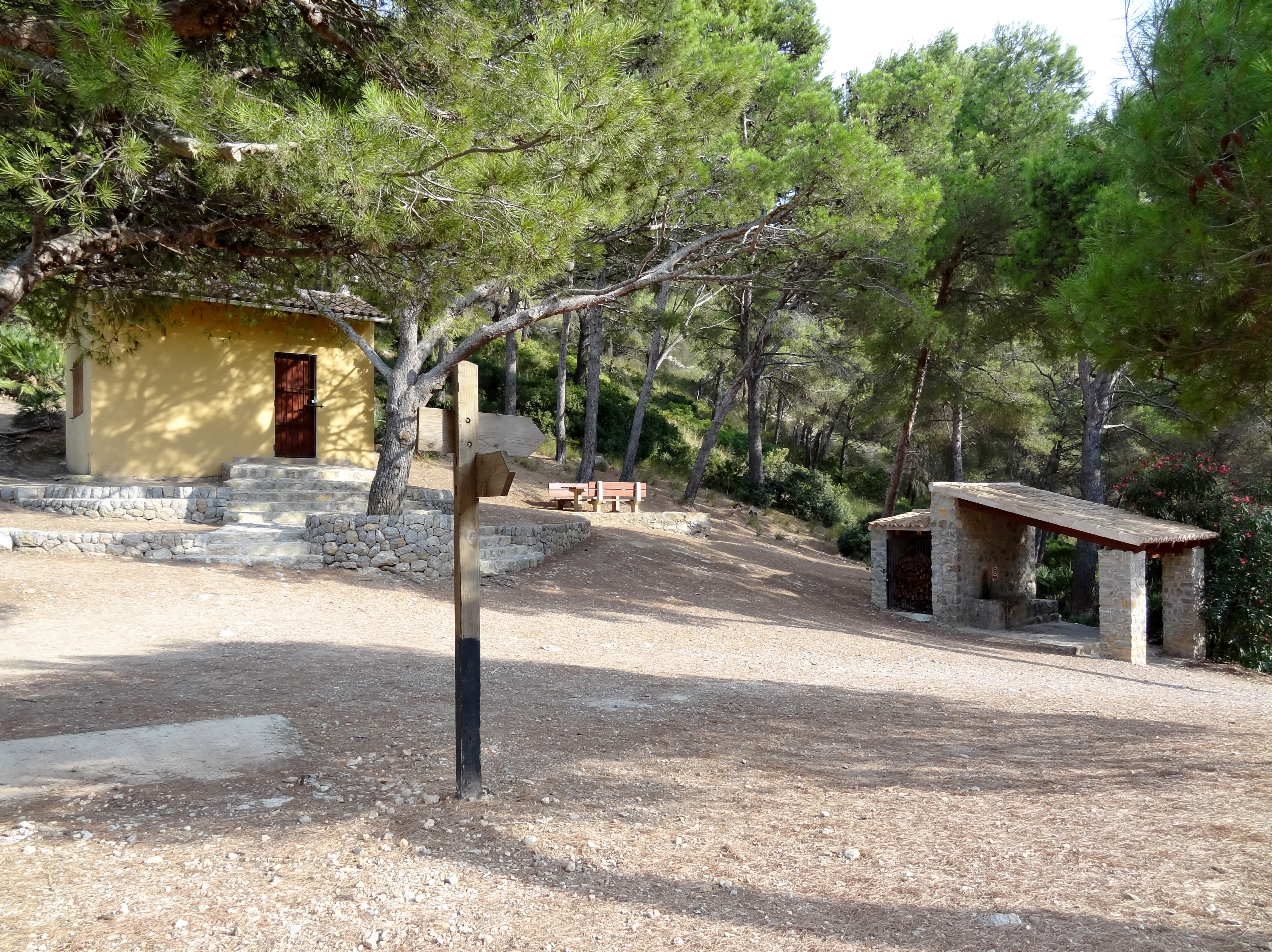 Refugi des Coll Baix (‚Schutzhütte am Niedrigen Pass‘) auf der Halbinsel Victòria in der Gemeinde Alcúdia, Mallorca, Spanien